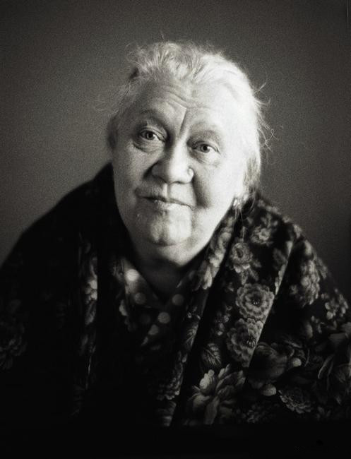 Галина Стаханова — советская и российская актриса театра и кино.